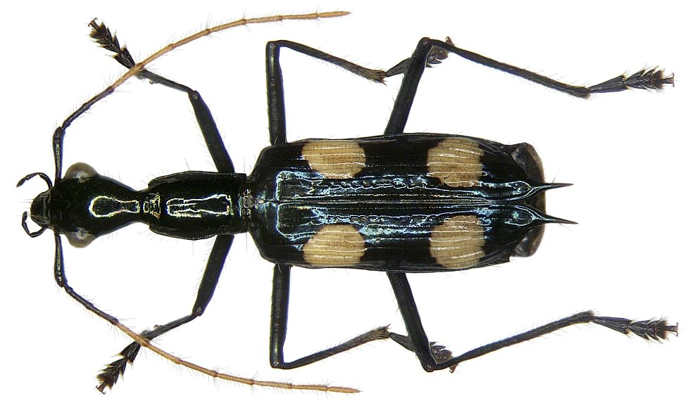 Familie: Carabidae Grösse: 13 mm Fundort: Costa Rica, Tarcoles leg. U.Schmidt, 1996; det. W.Lorenz, 2008 Foto: U.Schmidt, 2008